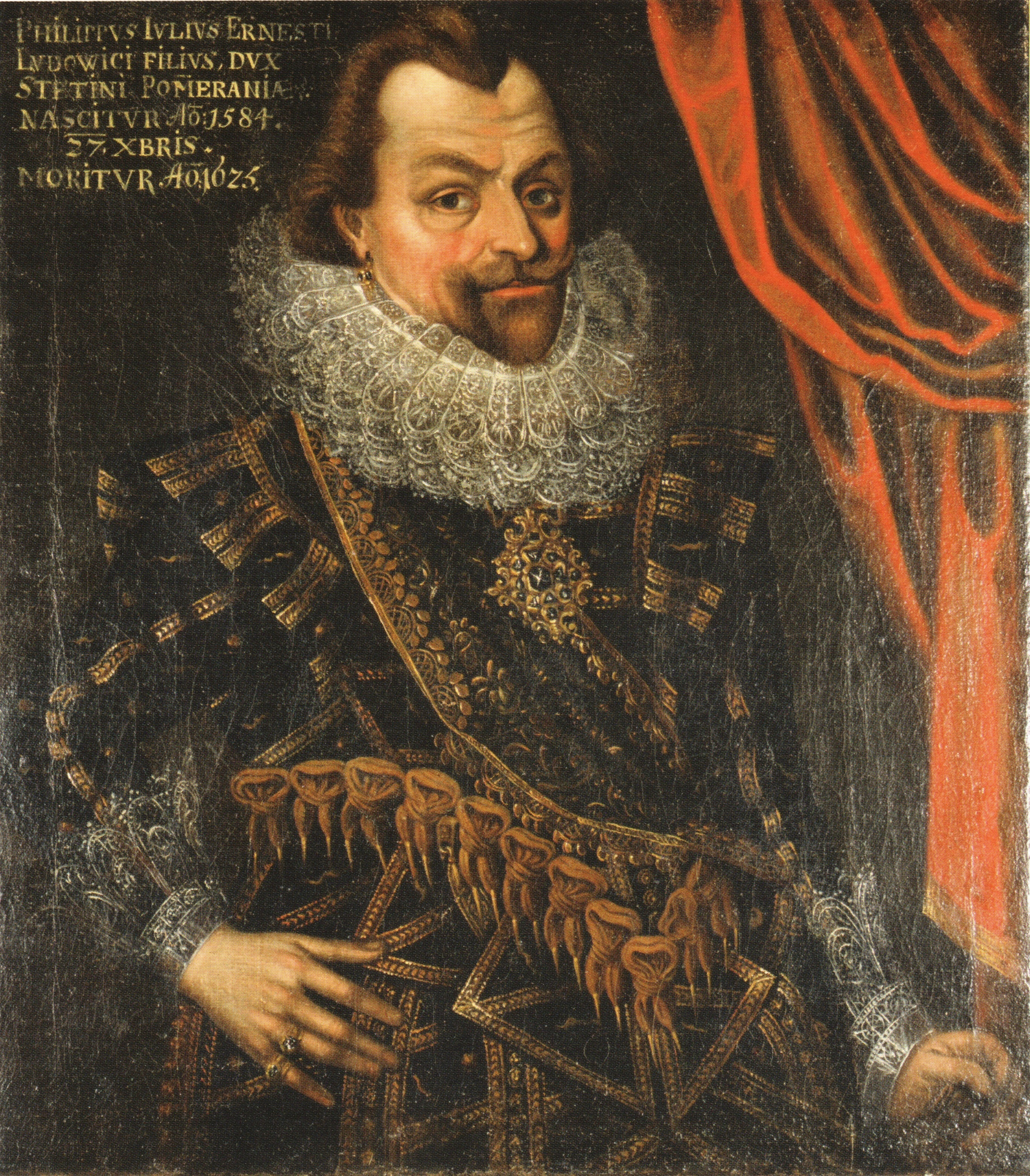 Ölgemälde von Herzog Philipp Julius von Pommern, Kopie nach einer Vorlage im Alten Rathaus in Anklam